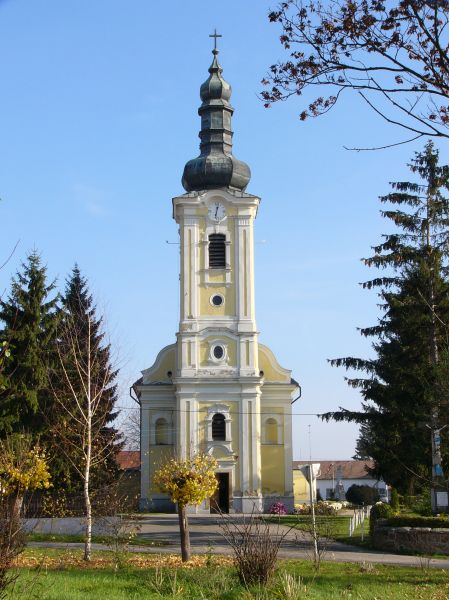 Érsekvadkerti Szent András római katolikus templom